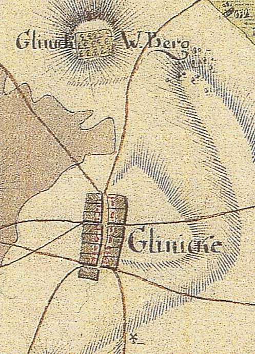 Glienick auf der Schmettau'schen Karte von 1767-87, Glienick, Stadt Zossen, Brandenburg, Deutschland